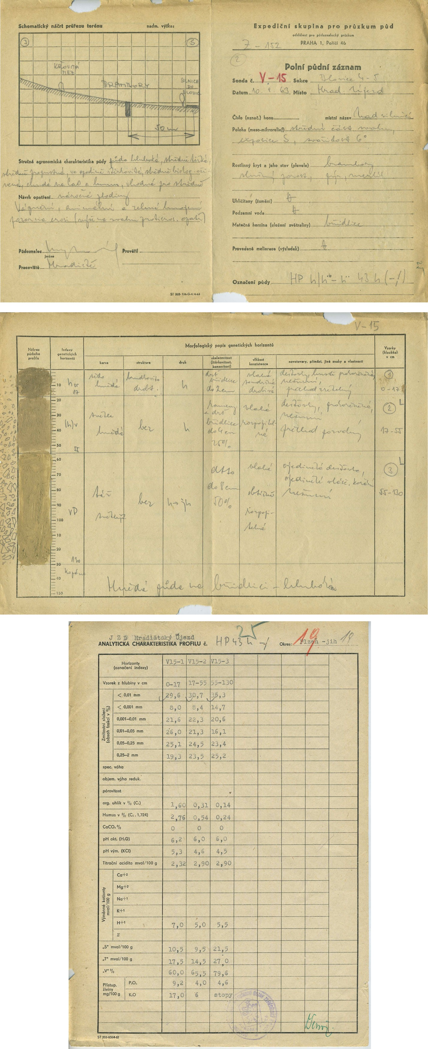 Polní půdní záznam výběrové sondy KPP